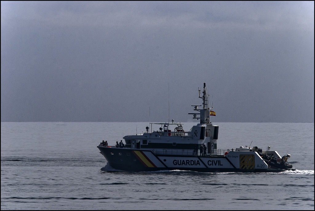 Patrullera de la Guardia Civil saliendo del Puerto de Valencia